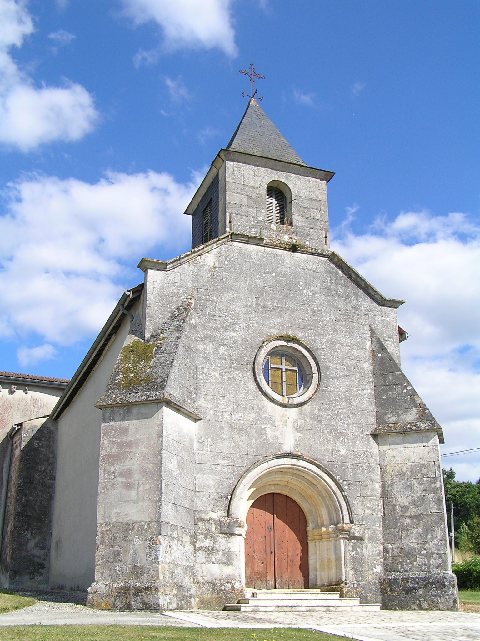 église de Chantillac